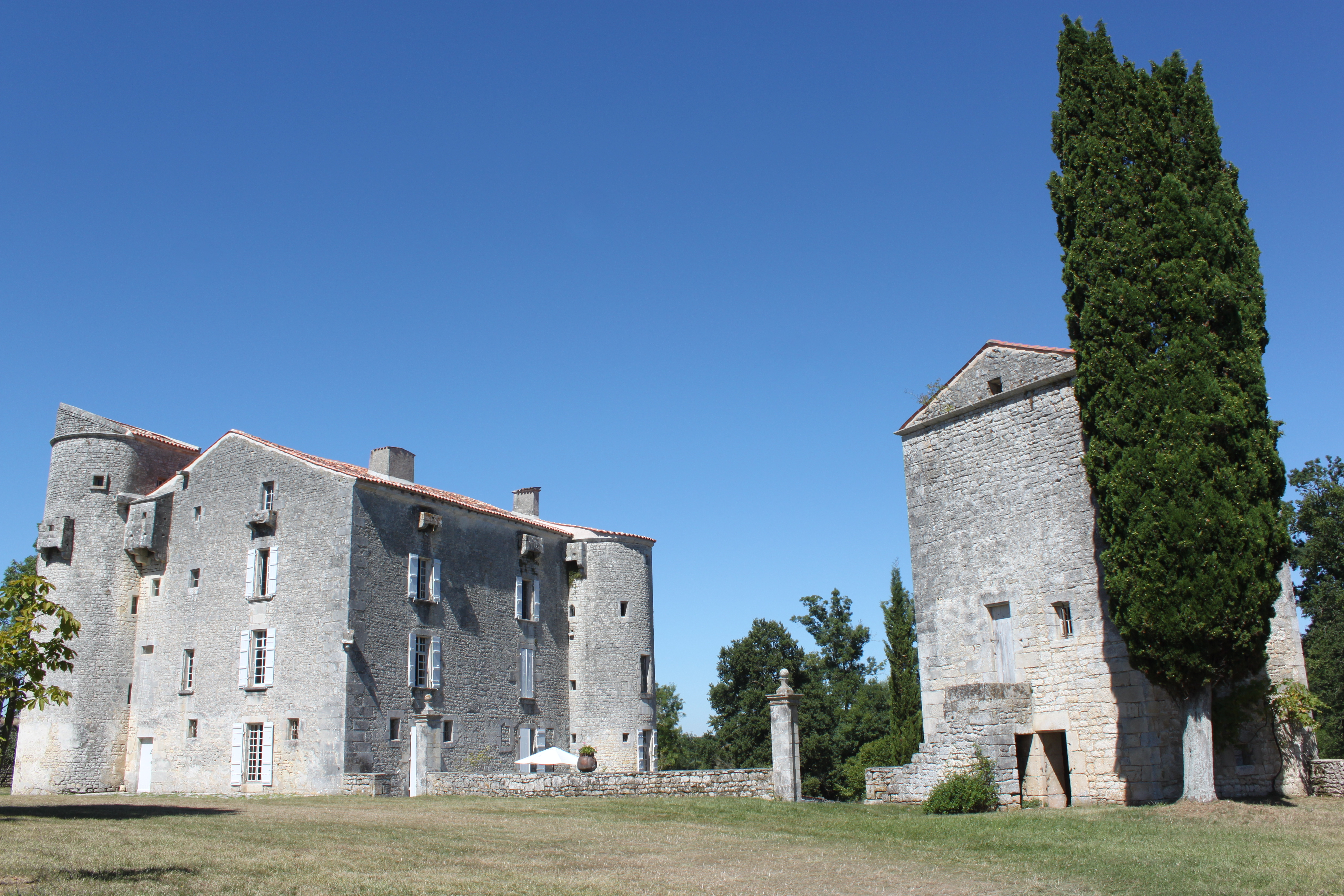 Prévoté, Saint-Saturnin, Fr-17-Port-d'Envaux.